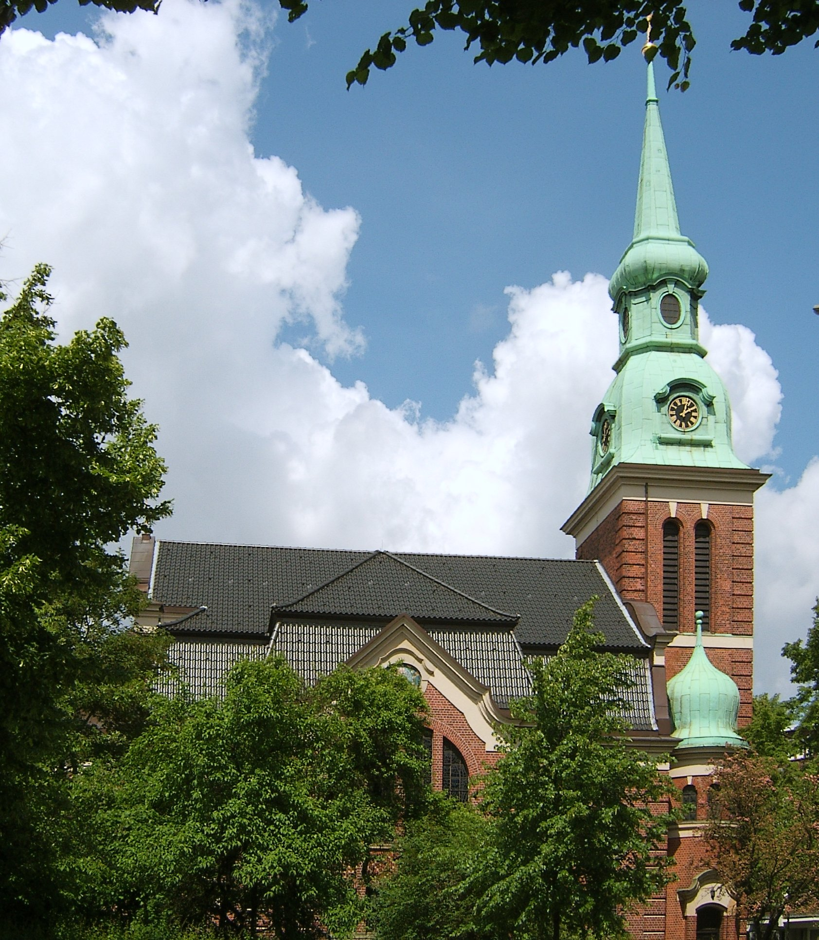 Hamburg, Winterhude, Matthäuskirche